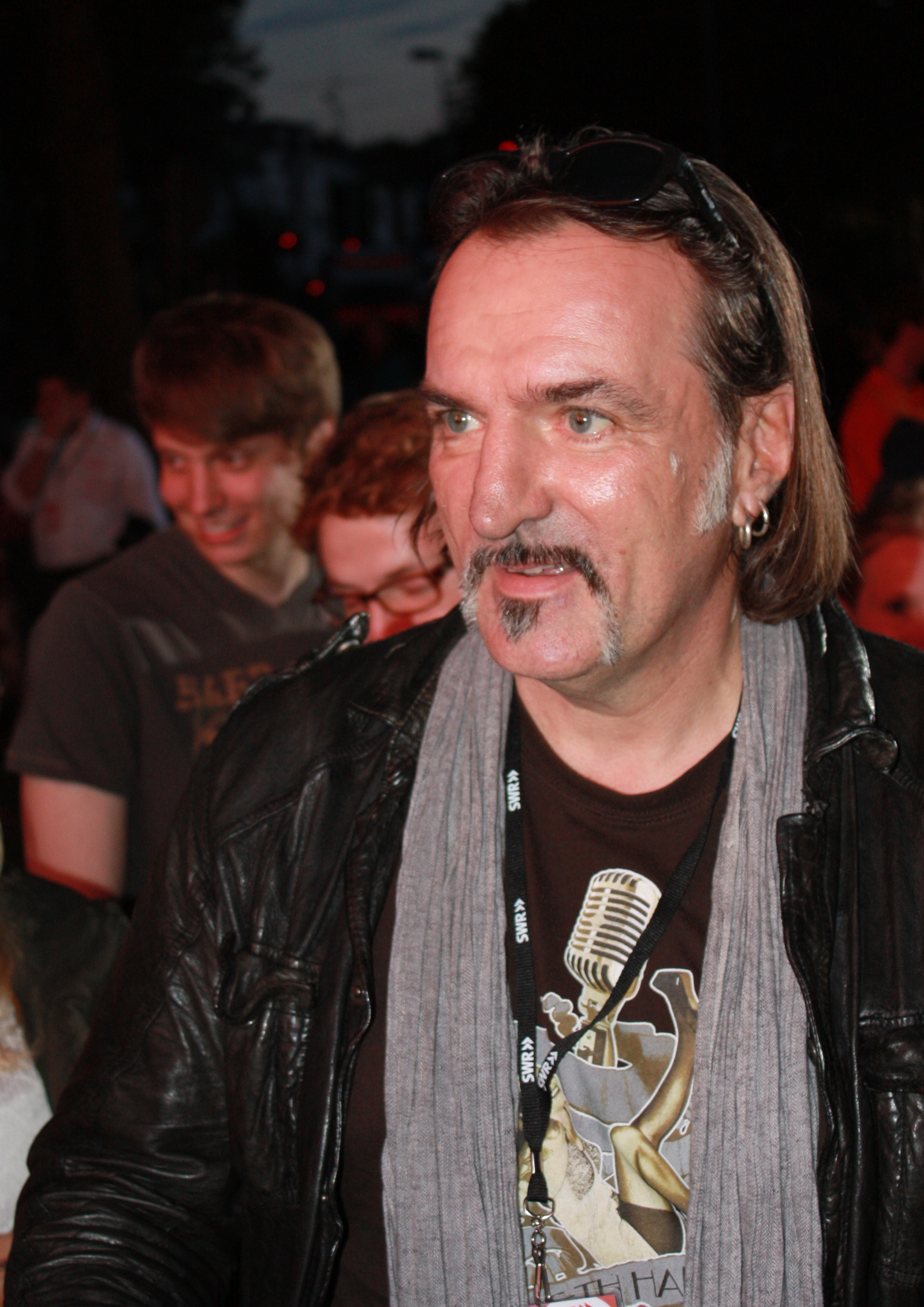 Andreas Hoppe (Schauspieler "Mario Kopper") beim SWR Sommerfestival 2013 in Mainz, eingeladen mit Ulrike Folkerts (Schauspielerin "Lena Odenthal") als Gäste zur Open Air Tatort-Vorpremiere